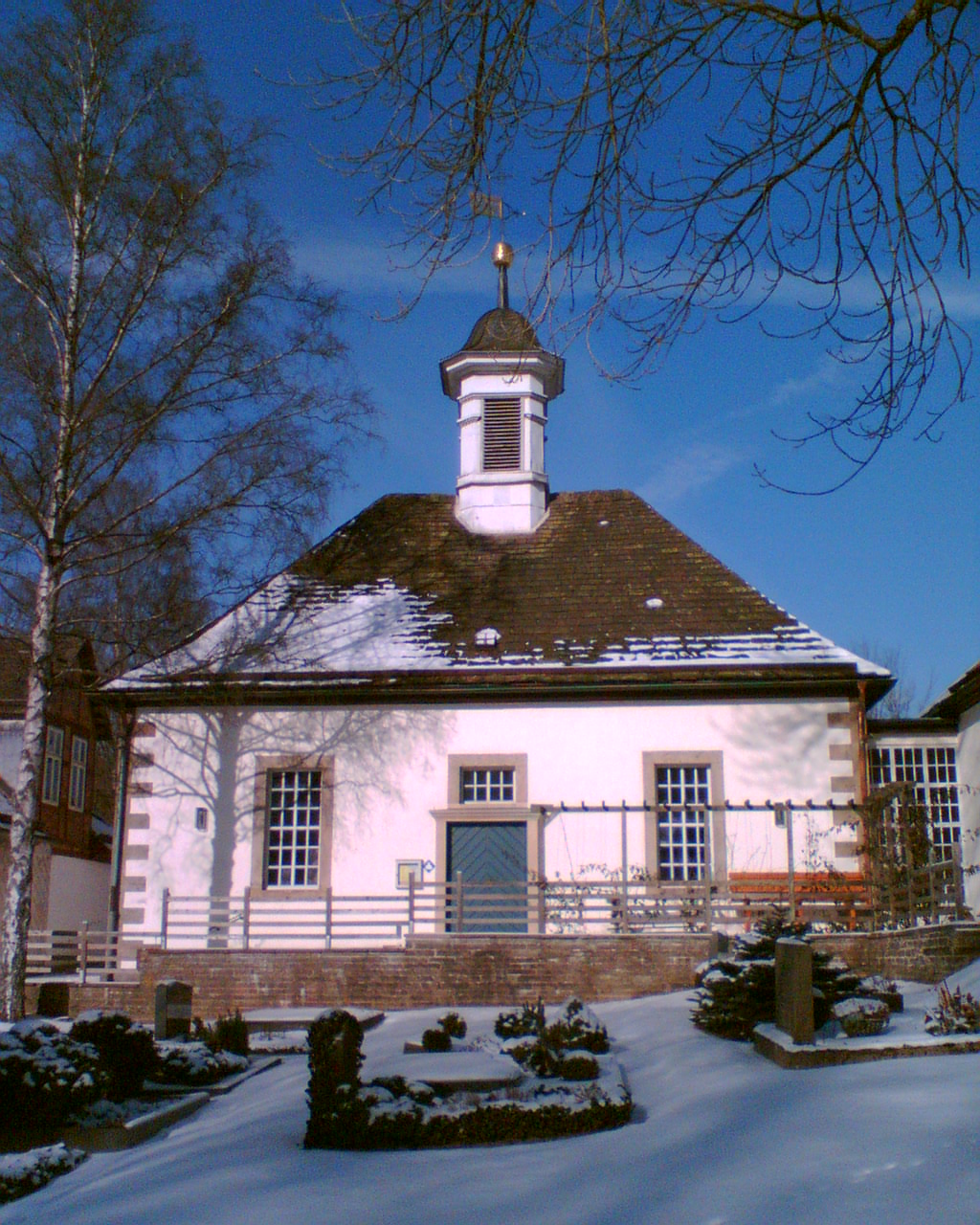 Kapellenbauwerk aus der zweiten Hälfte des 18. Jahrhunderts im Stadtteil Neuhaus im Solling der Stadt Holzminden